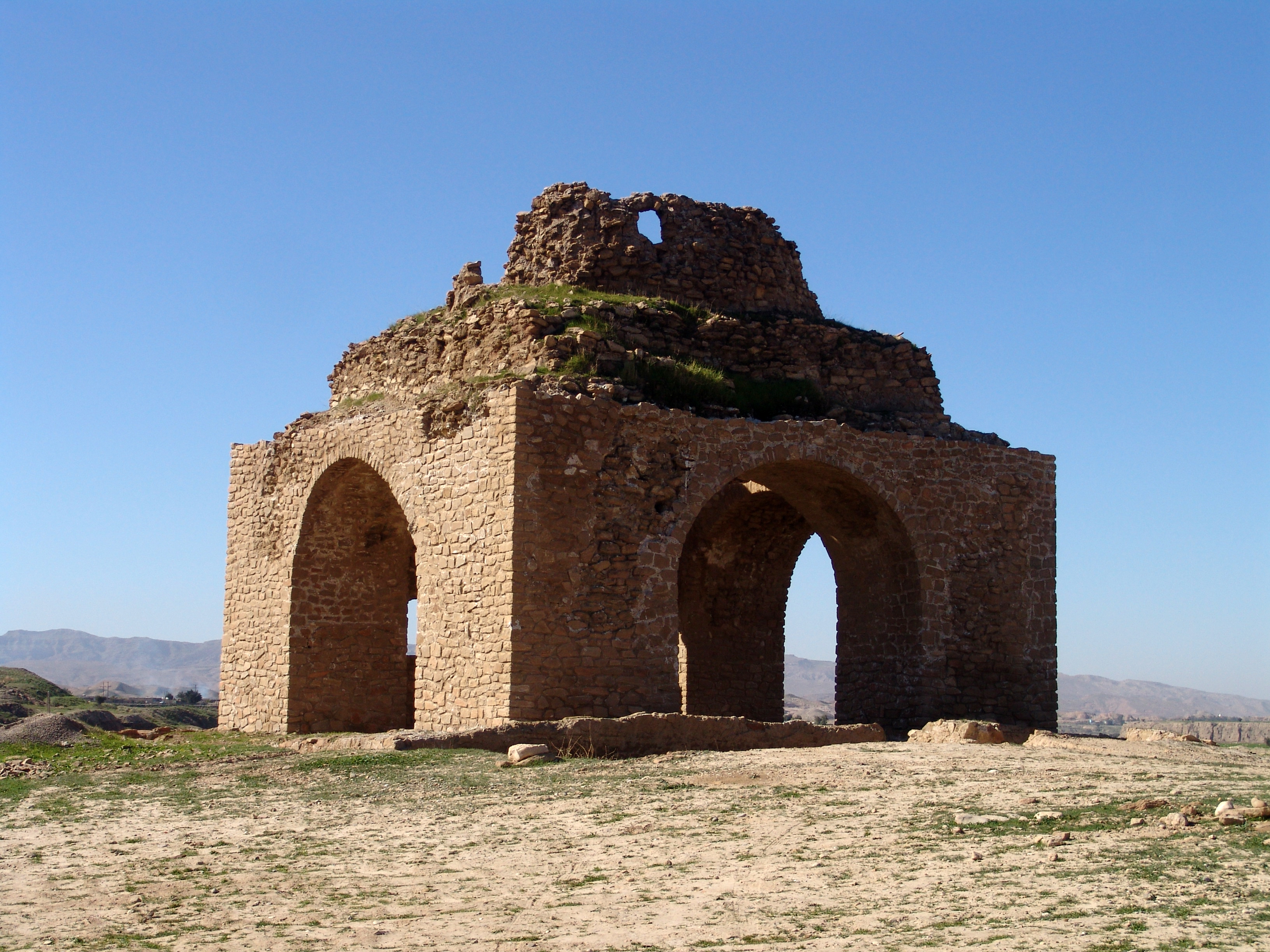 چهارطاقی خیرآباد در روستای خیرآباد، دهدشت